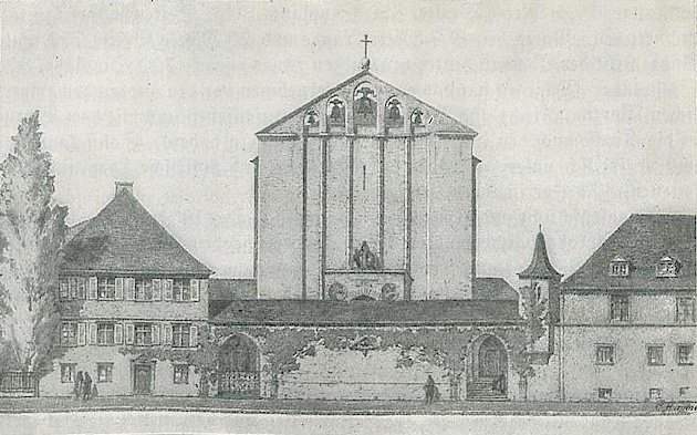 Katholische St. Fideliskirche in Stuttgart, Foto von 1926.